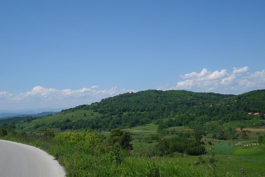 Pogled iz Netretića